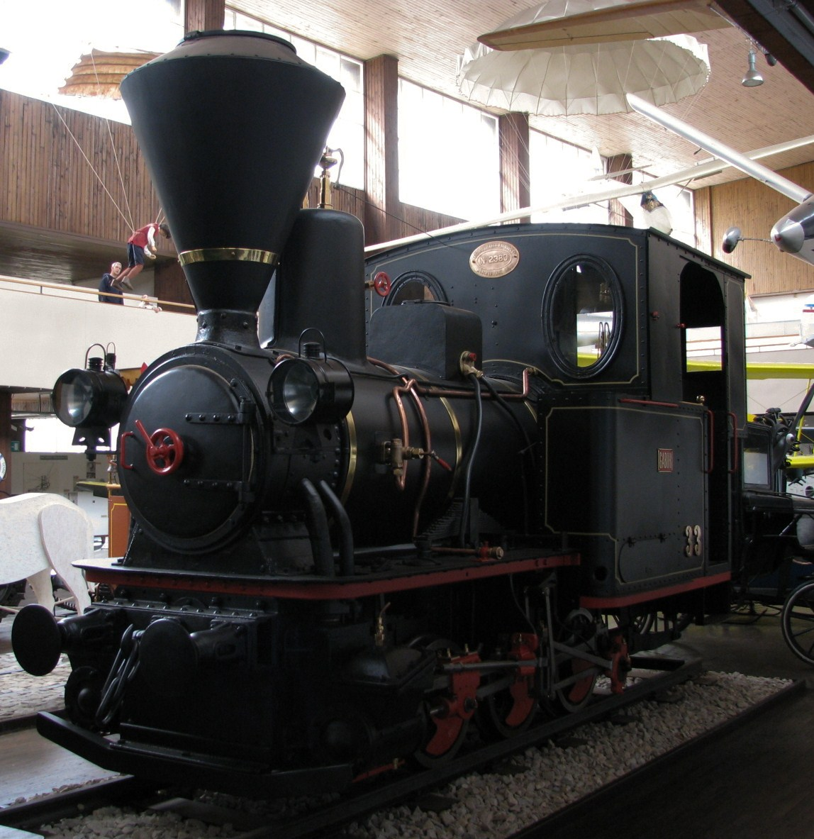 Uskotračna (1000mm) lokomotiva Gabor 33 iz serije 30, konstruirana 1890. u Krauss&Company (München, Njemačka), korištena za potrebe Slavonsko-podravskih željeznica. Tehnički muzej u Zagreb.